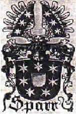 Adelsgeschlecht aus der Mark Brandenburg